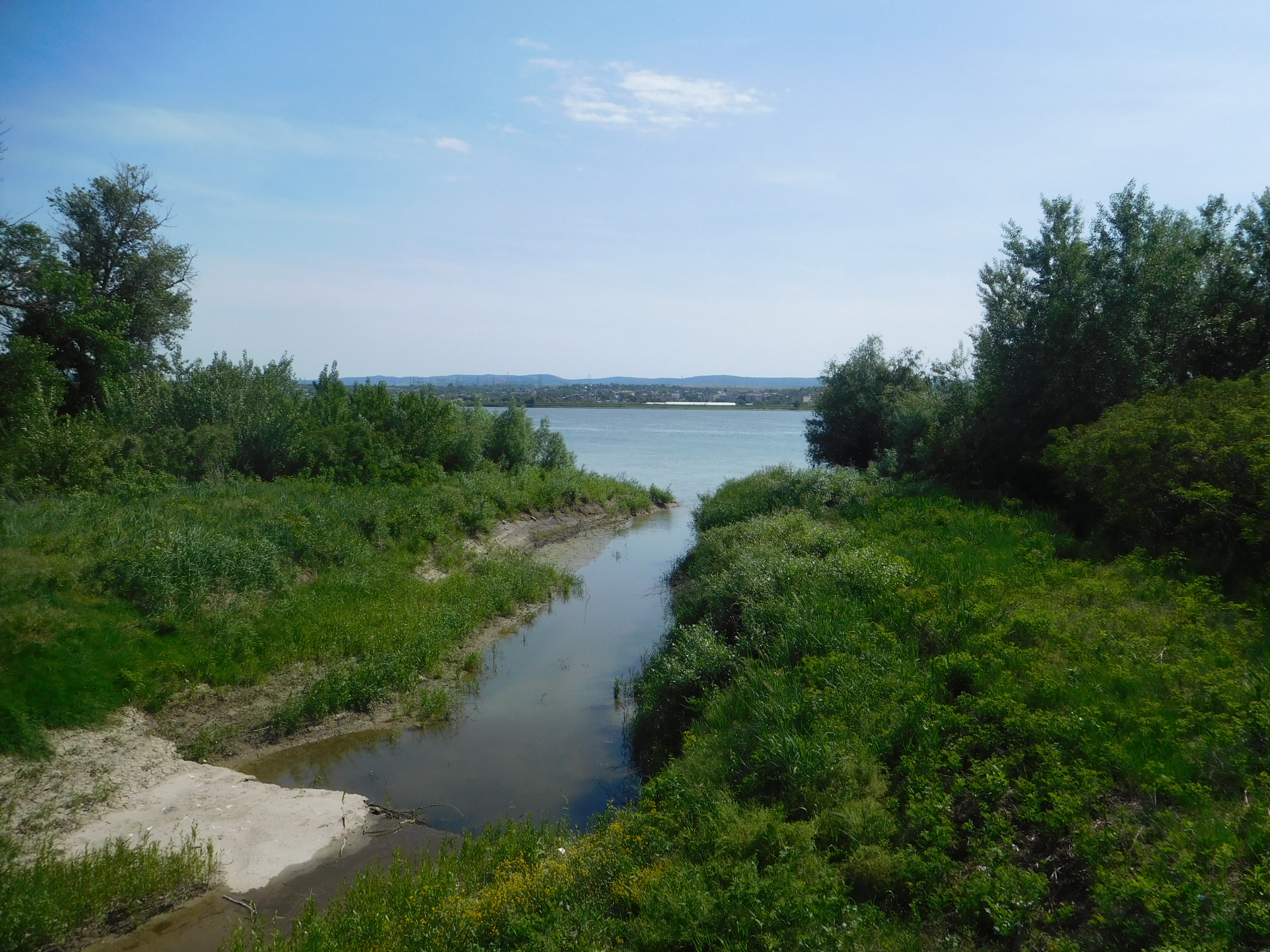 Канал Прорва, що поєднує оз. Картал із Дунаєм